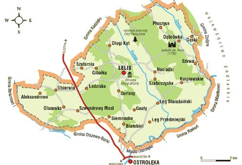 Mapa Gminy Lelis